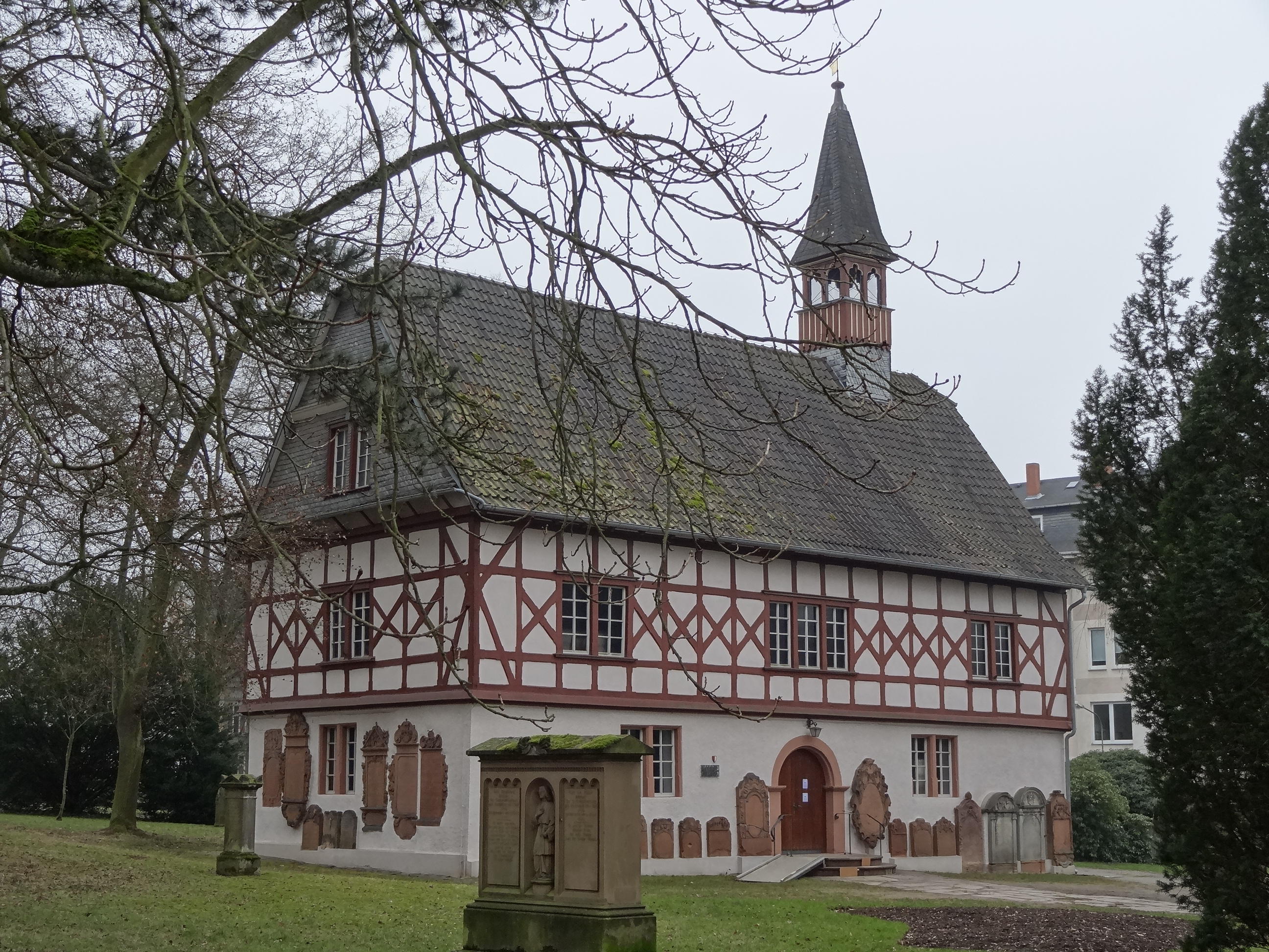 Alter Friedhof Gießen